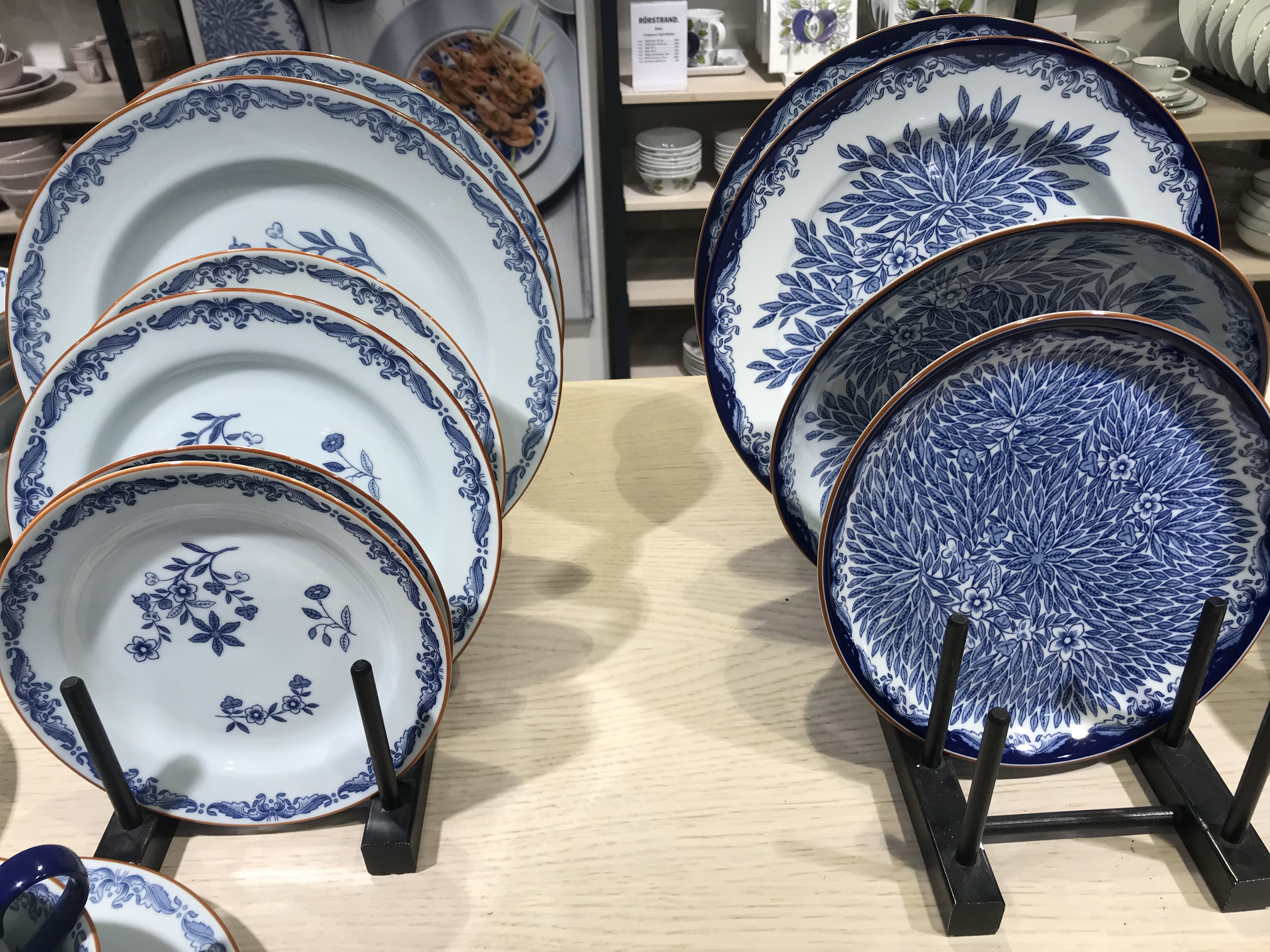 Servisen Ostindia till vänster, formgiven av Nils Lundström. Till höger är servisen Ostindia Floris.